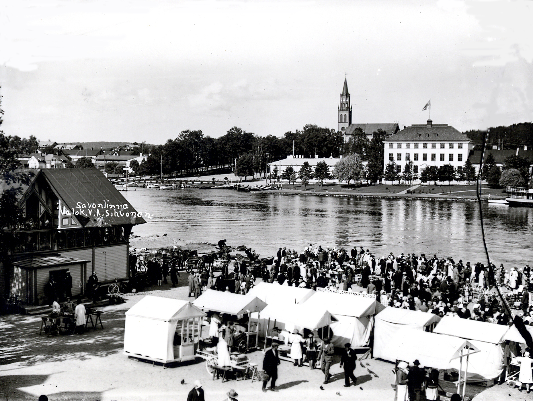 Savonlinnan Kauppatori kesällä n. v. 1926-1932. Näkymä Seurahuoneen ikkunasta länteen kohti Savonlinnan kirkkoa. Torilla paljon väkeä, myyntikojuja, pöytiä. Vasemmalla Kauppahalli, oikealla Puistokadun koulussa Suomen lippu katolla. Kuvassa teksti "Savonlinna Valok. V. A. Sihvonen."